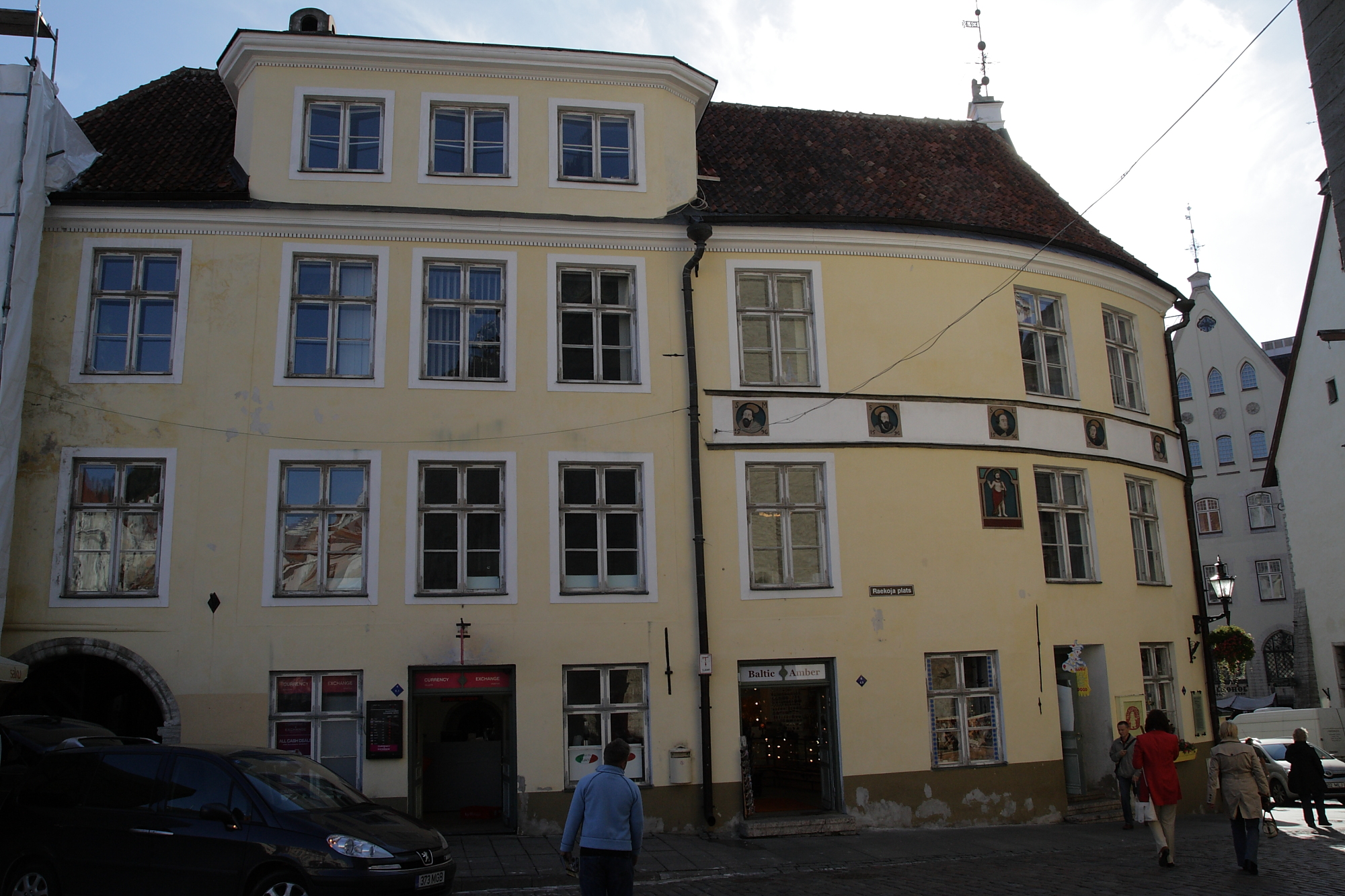 Tallinn, elamud Raekoja plats 18 ja Vanaturu kael 3, 14.-20.saj